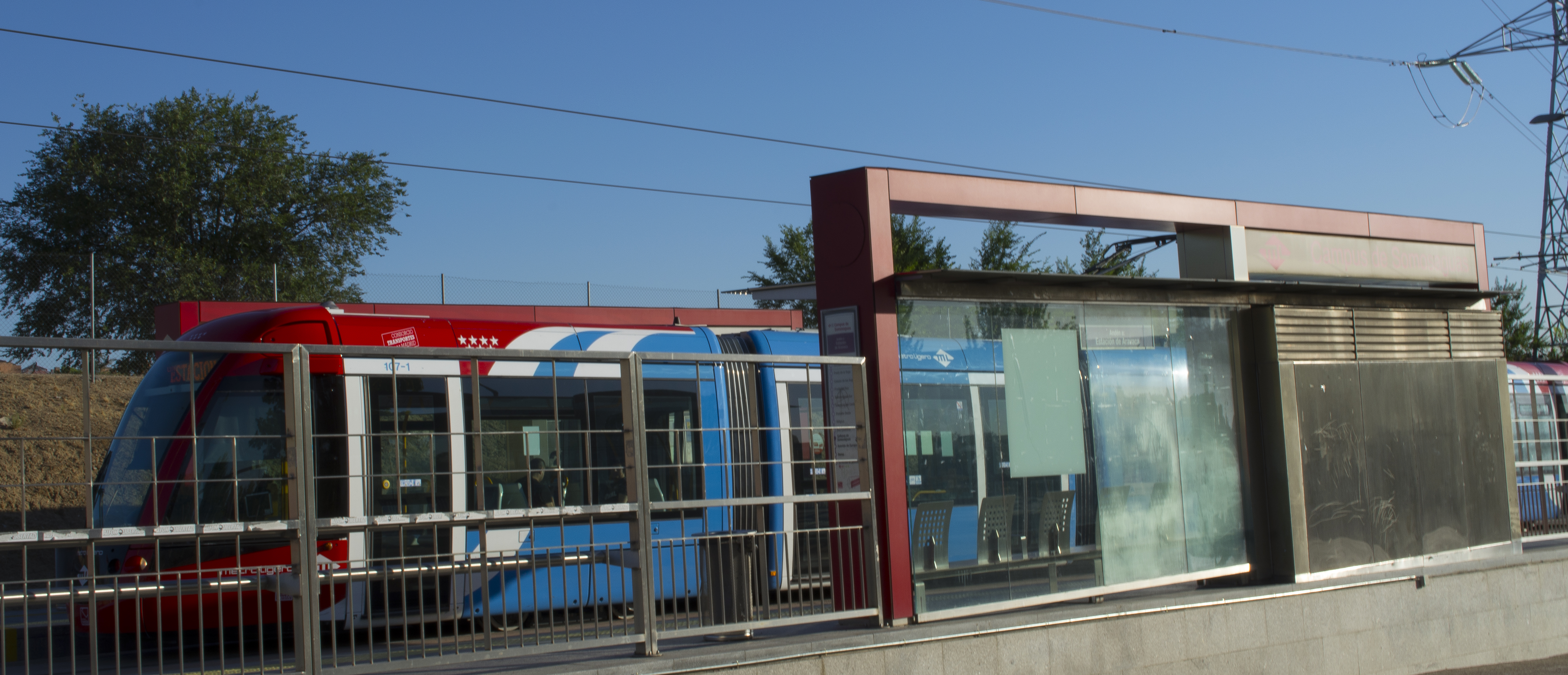 Exterior de la estación Campus de Somosaguas, de Metro Ligero Madrid.